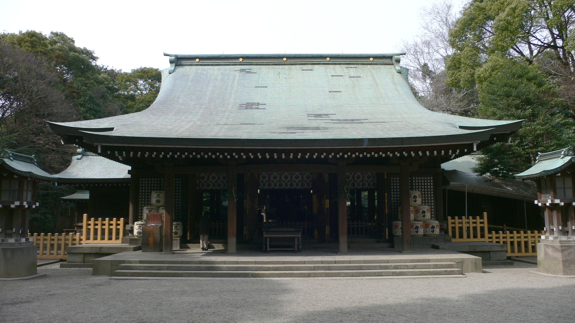 Hikawa-jinja (Sanctuary:拝殿)